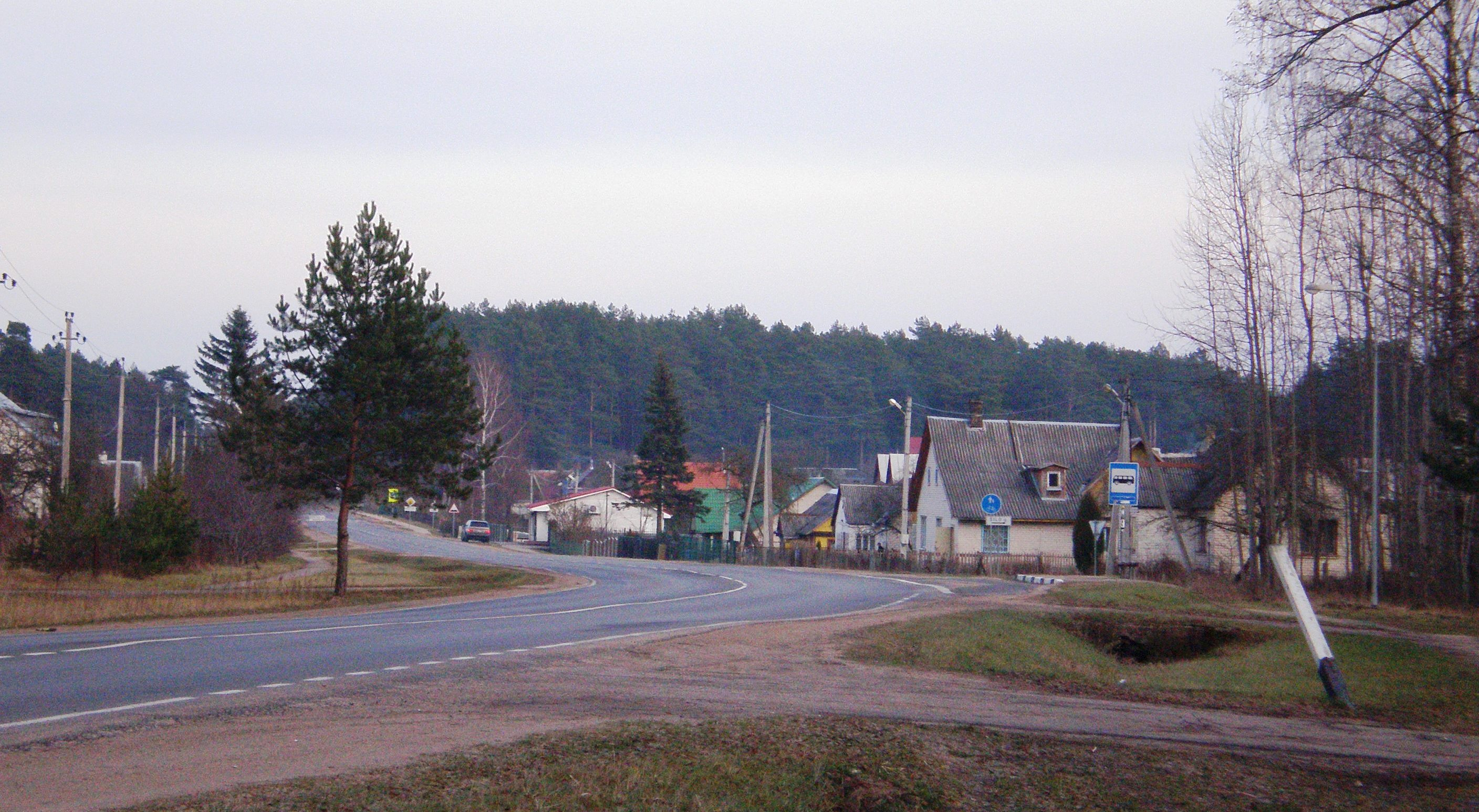 Baltosios Vokės gatvė, Juodšiliai, Vilniaus raj.